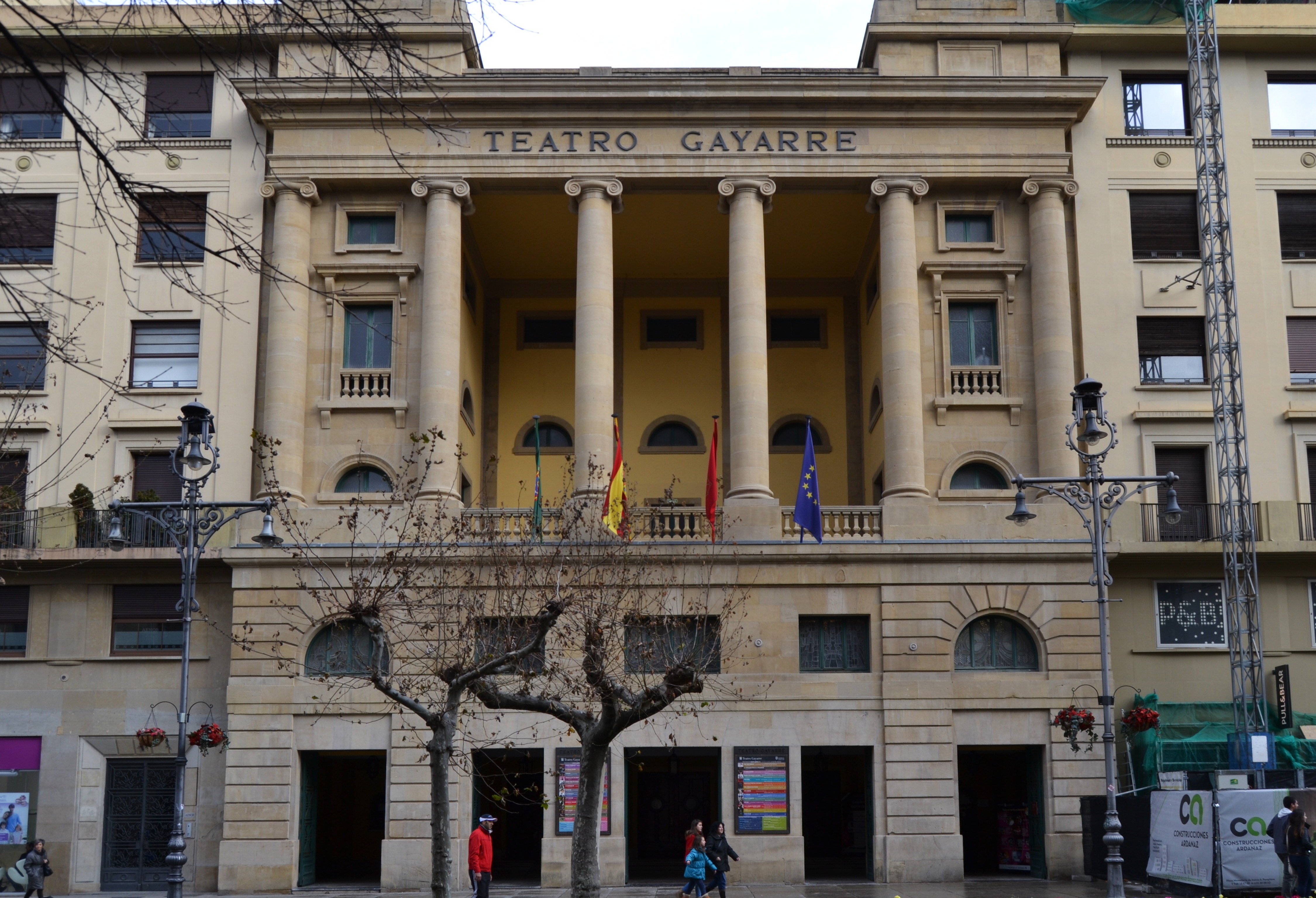 Gaiarre antzokia